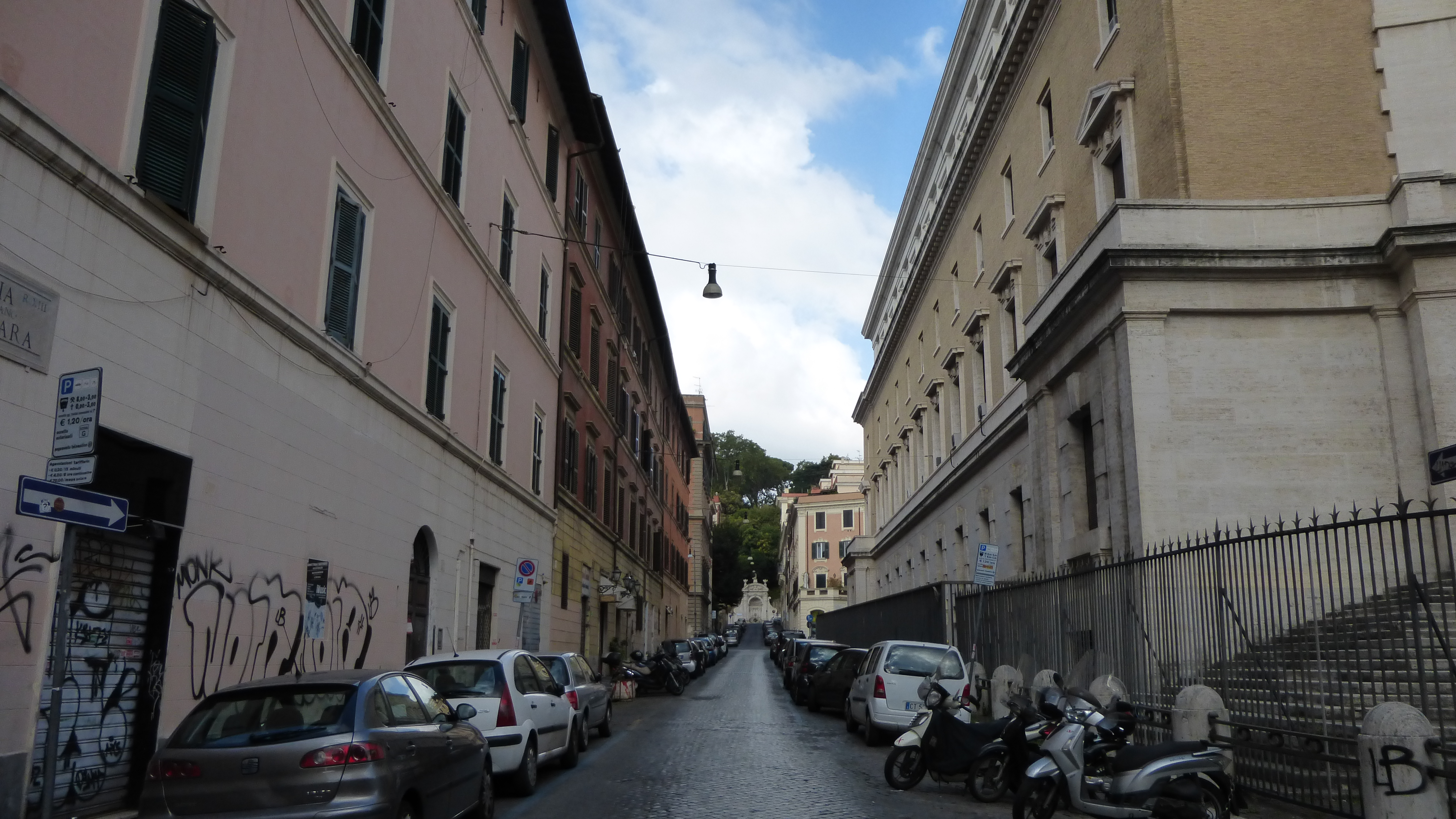 Roma, via Luciano Manara. In fondo, la Fontana del Prigione.